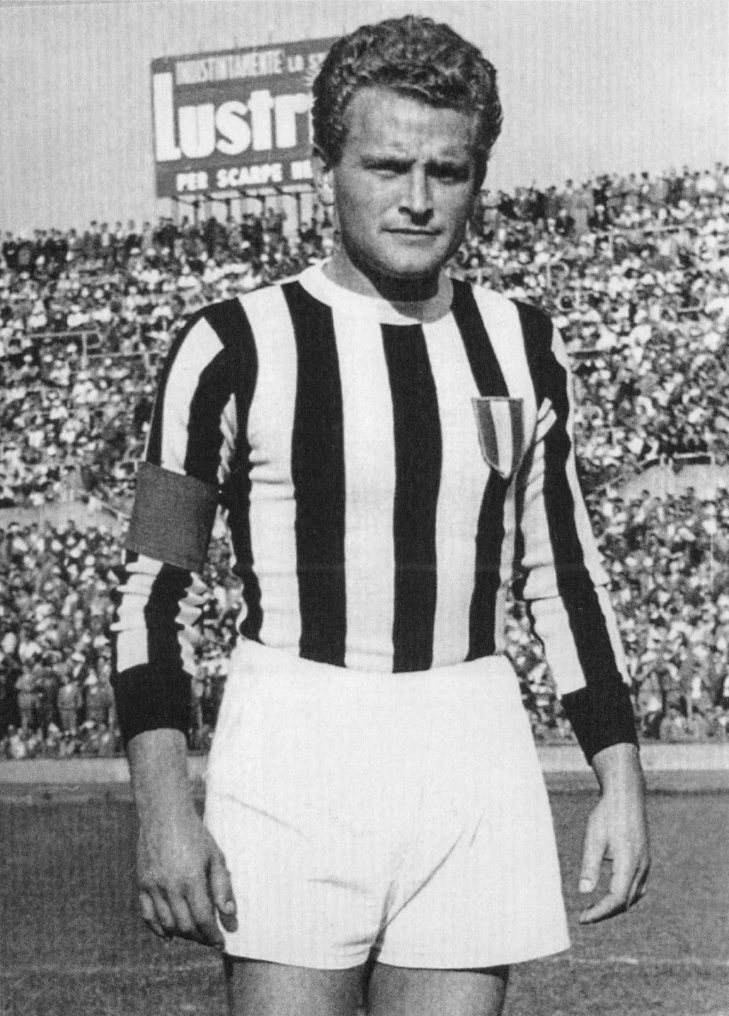 Il calciatore italiano Giampiero Boniperti alla Juventus nei primi anni 50 del XX secolo.